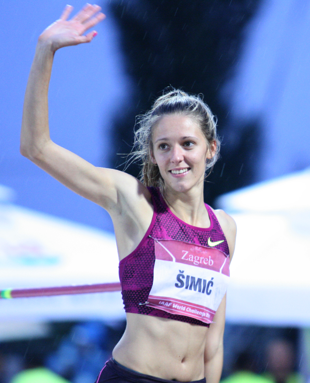 Ana Šimić na Hanžekovićevom memorijalu 2014. godine